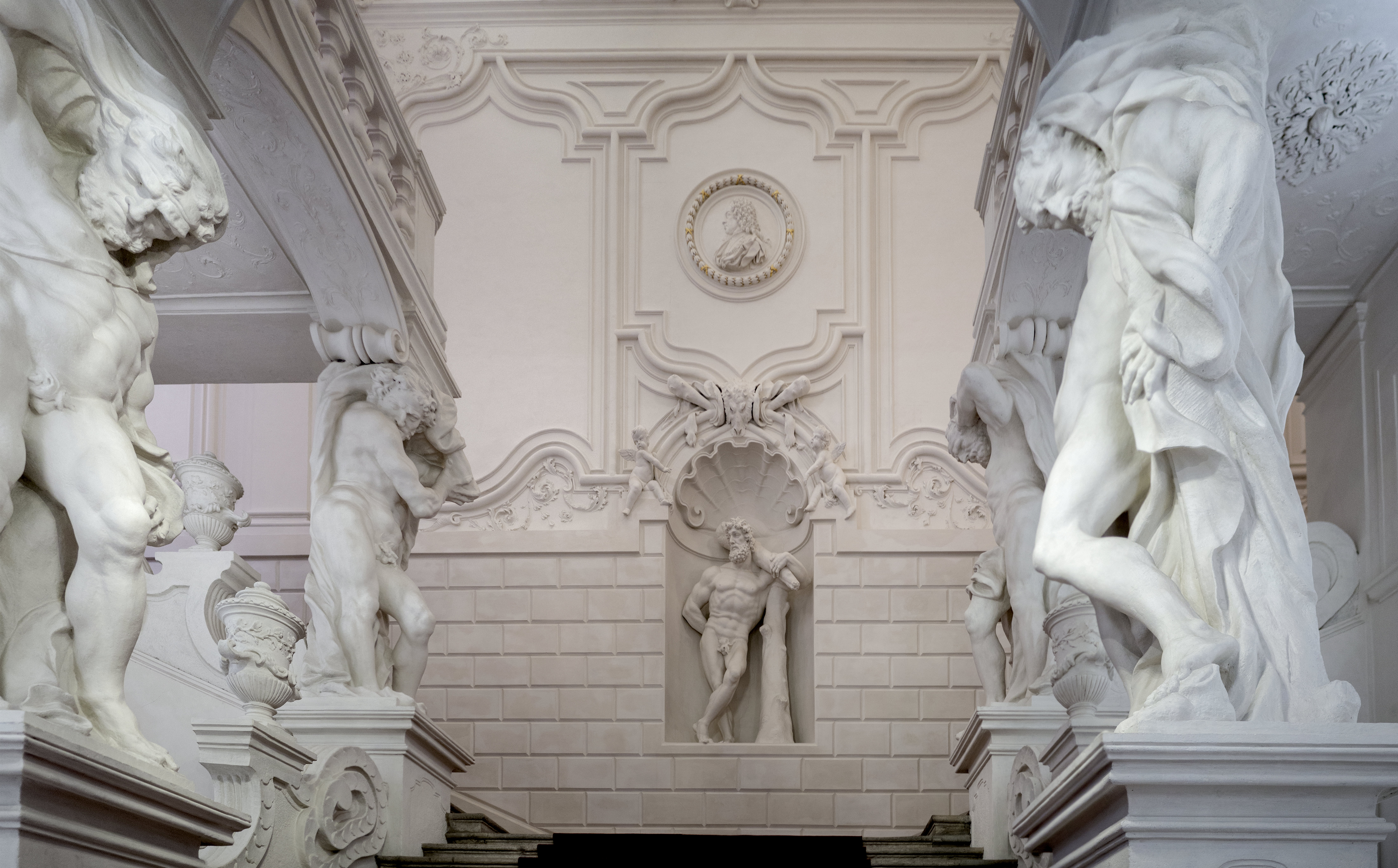 Ehem. Stadtpalais des Prinzen Eugen, BM für Finanzen